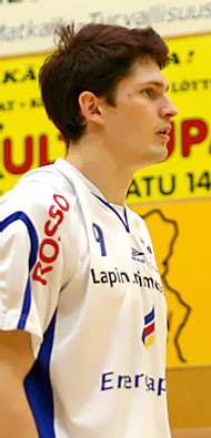 Marko Aho kaudella 2005 Napapiirin Pallokettujen paidassa